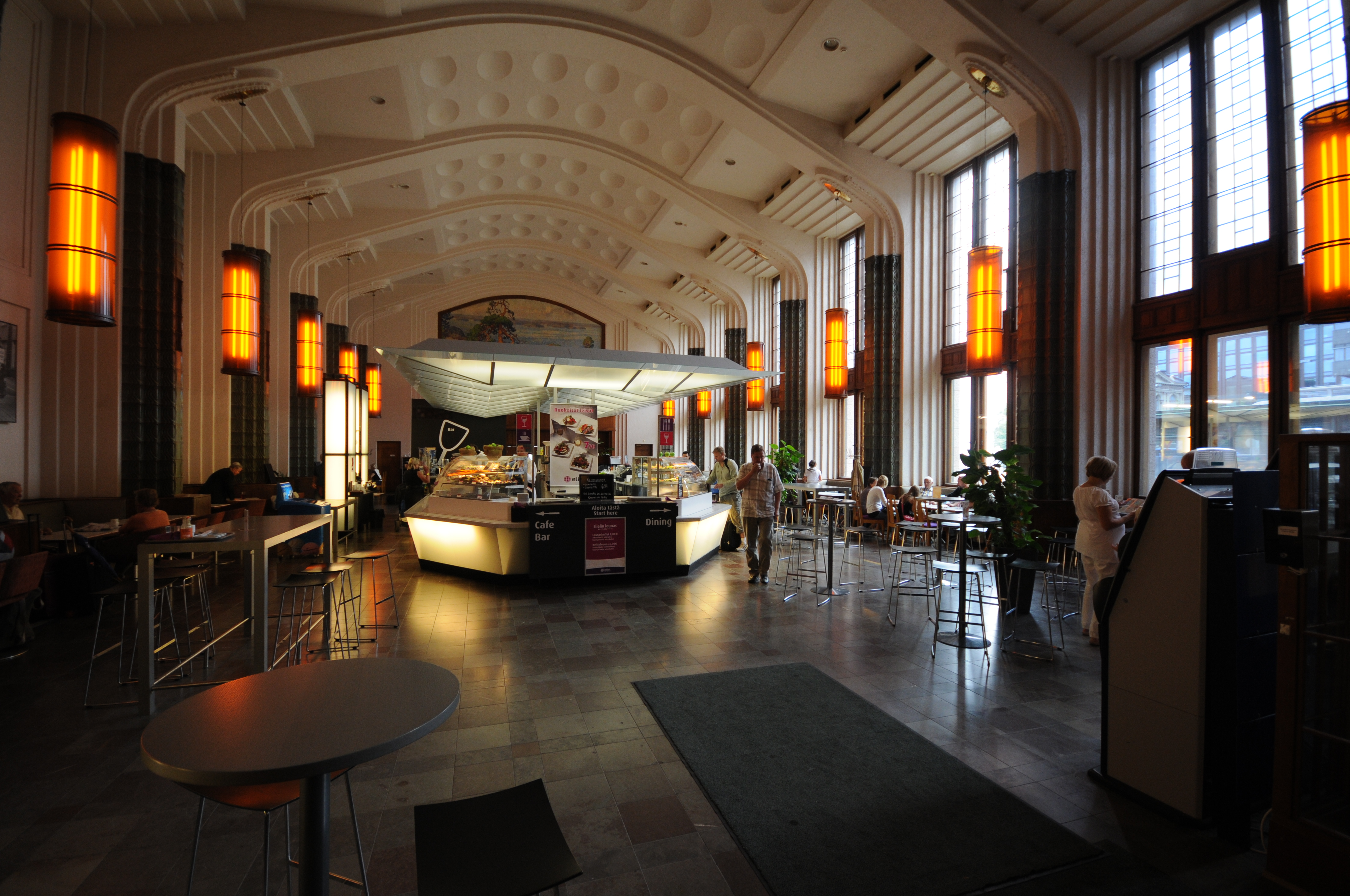 Helsinki